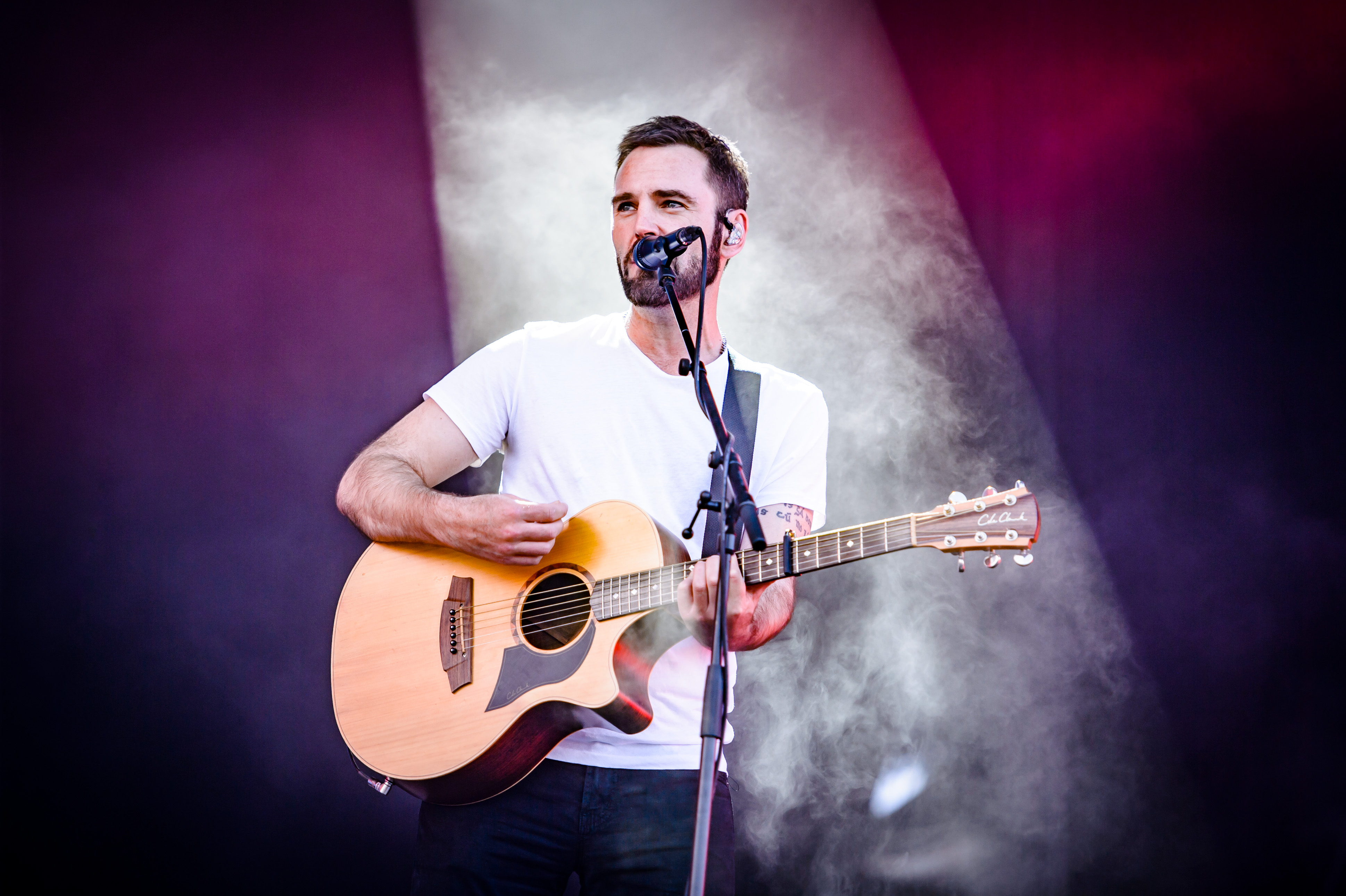 'Rock im Park 2018; Zeppelinfeld Nürnberg': 'Snow Patrol'